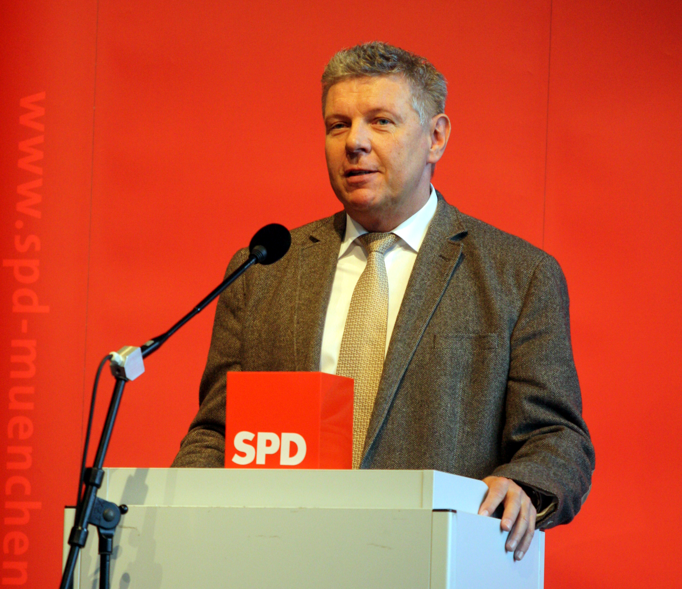 Dieter Reiter, deutscher Kommunalpolitiker (SPD) und Leiter des Referates für Arbeit und Wirtschaft der Landeshauptstadt München während des kleinen SPD-Parteitages am 20.04.2013 in München-Trudering.